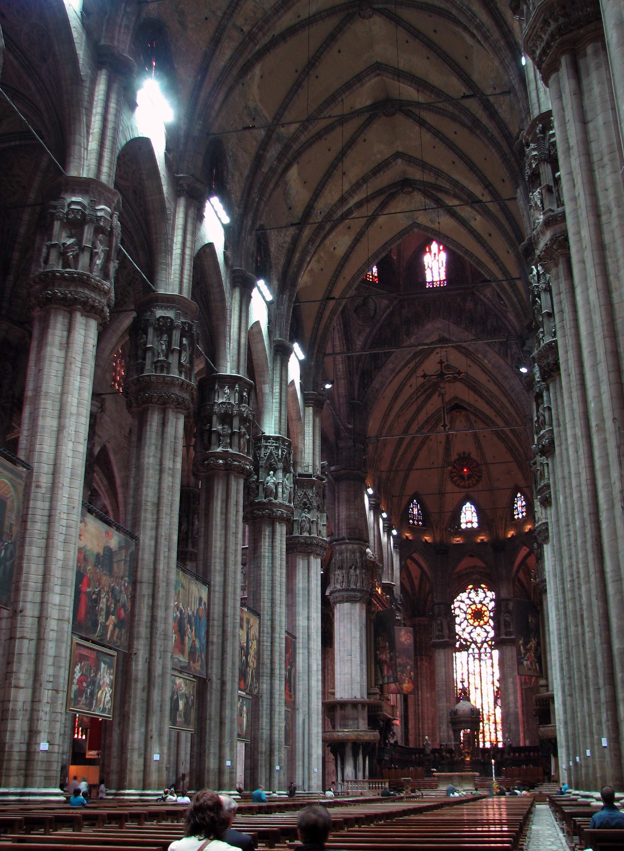 Milano, Italia